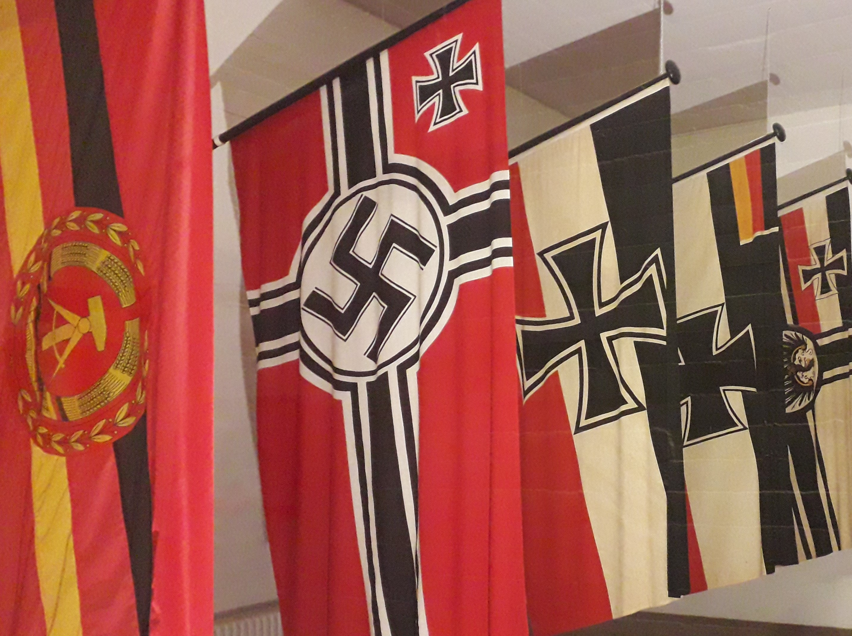 Deutsche Marineflaggen als Ausstellungsstück im Marineehrenmal Laboe Legal disclaimer This image shows (or resembles) a symbol that was used by the National Socialist (NSDAP/Nazi) government of Germany or an organization closely associated to it, or another party which has been banned by the Federal Constitutional Court of Germany. The use of insignia of organizations that have been banned in Germany (like the Nazi swastika or the arrow cross) are also illegal in Austria, Hungary, Poland, Czech Republic, France, Brazil, Israel, Ukraine, Russia and other countries, depending on context. In Germany, the applicable law is paragraph 86a of the criminal code (StGB), in Poland – Art. 256 of the criminal code (Dz.U. 1997 nr 88 poz. 553).